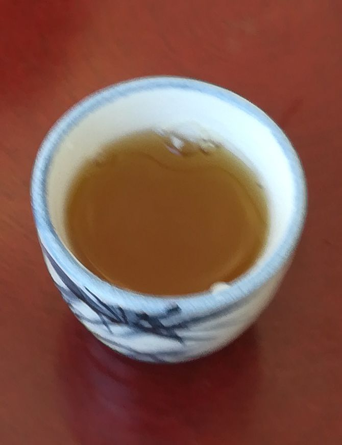 甘茶。2018年4月8日撮影。